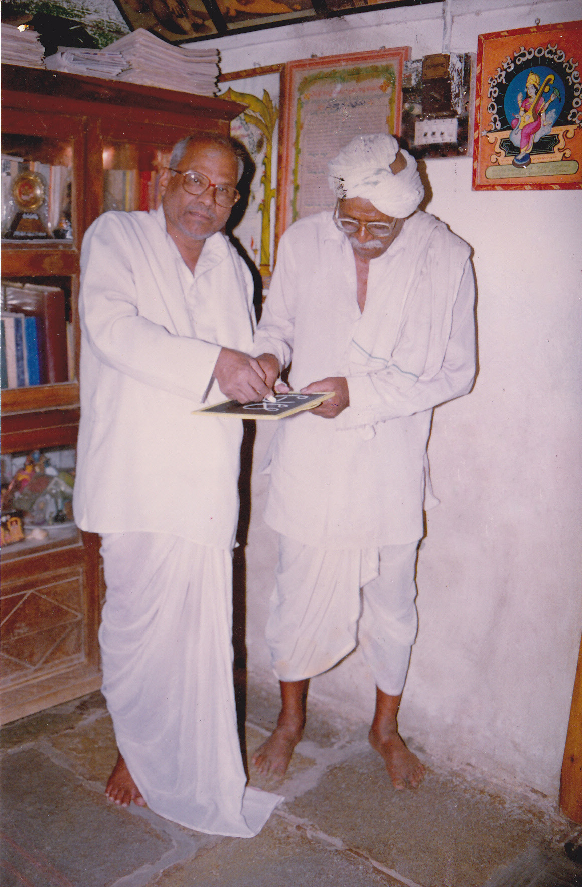 అక్షర స్వీకారం